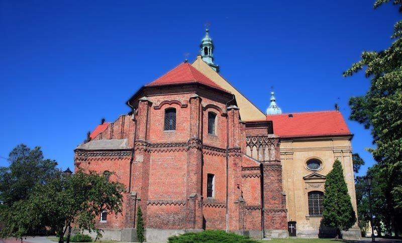 Łask, Poland by Ewa and Maek Wojciechowscy